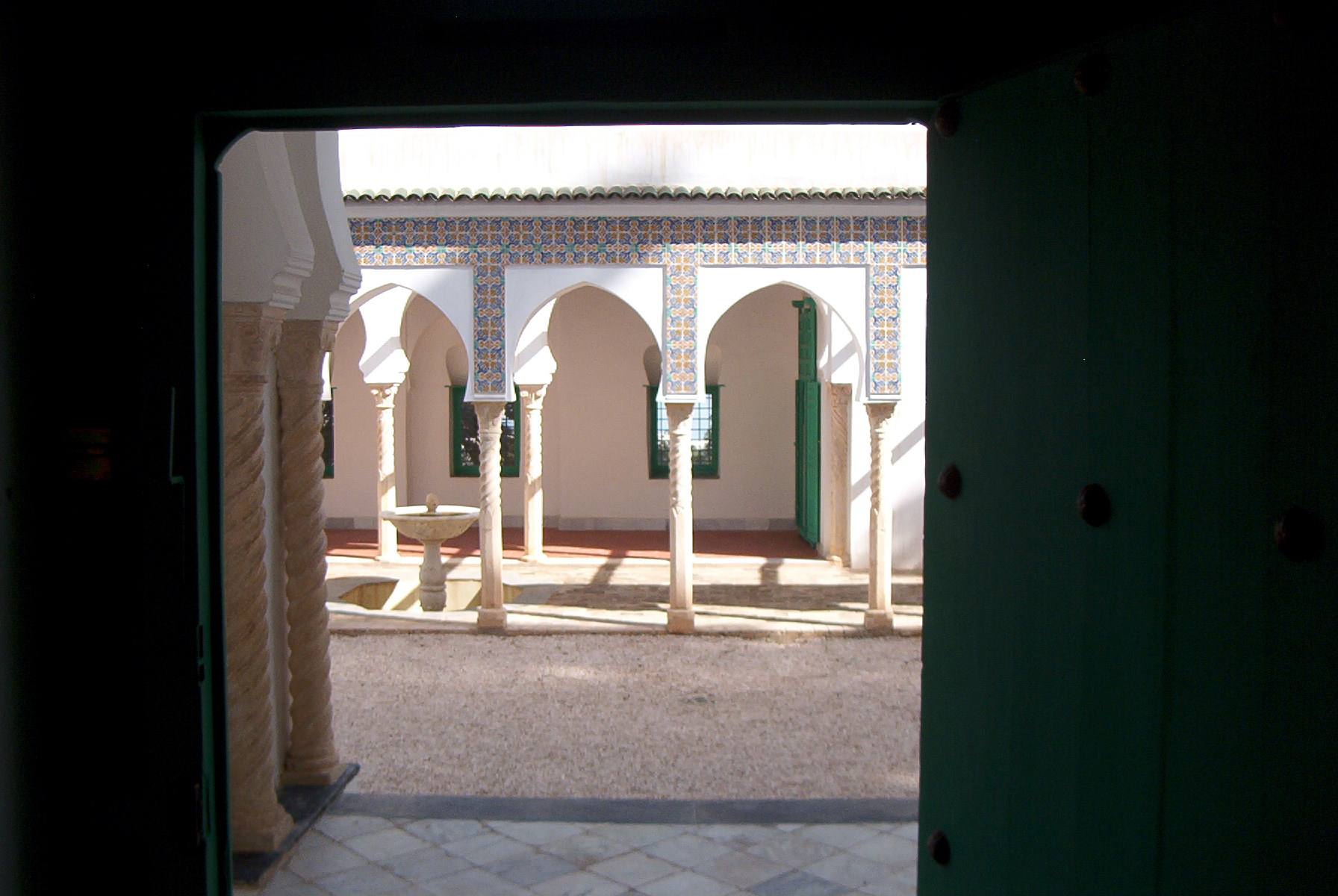 La cour de la villa Abd-el-Tif